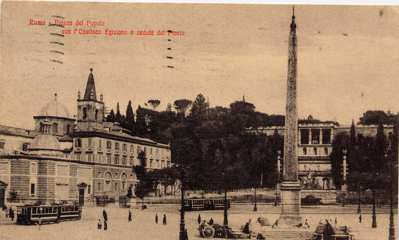 tram srto